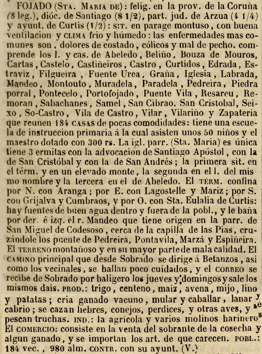 Foxado no Diccionario geográfico-estadístico-histórico de España y sus posesiones de Ultramar.